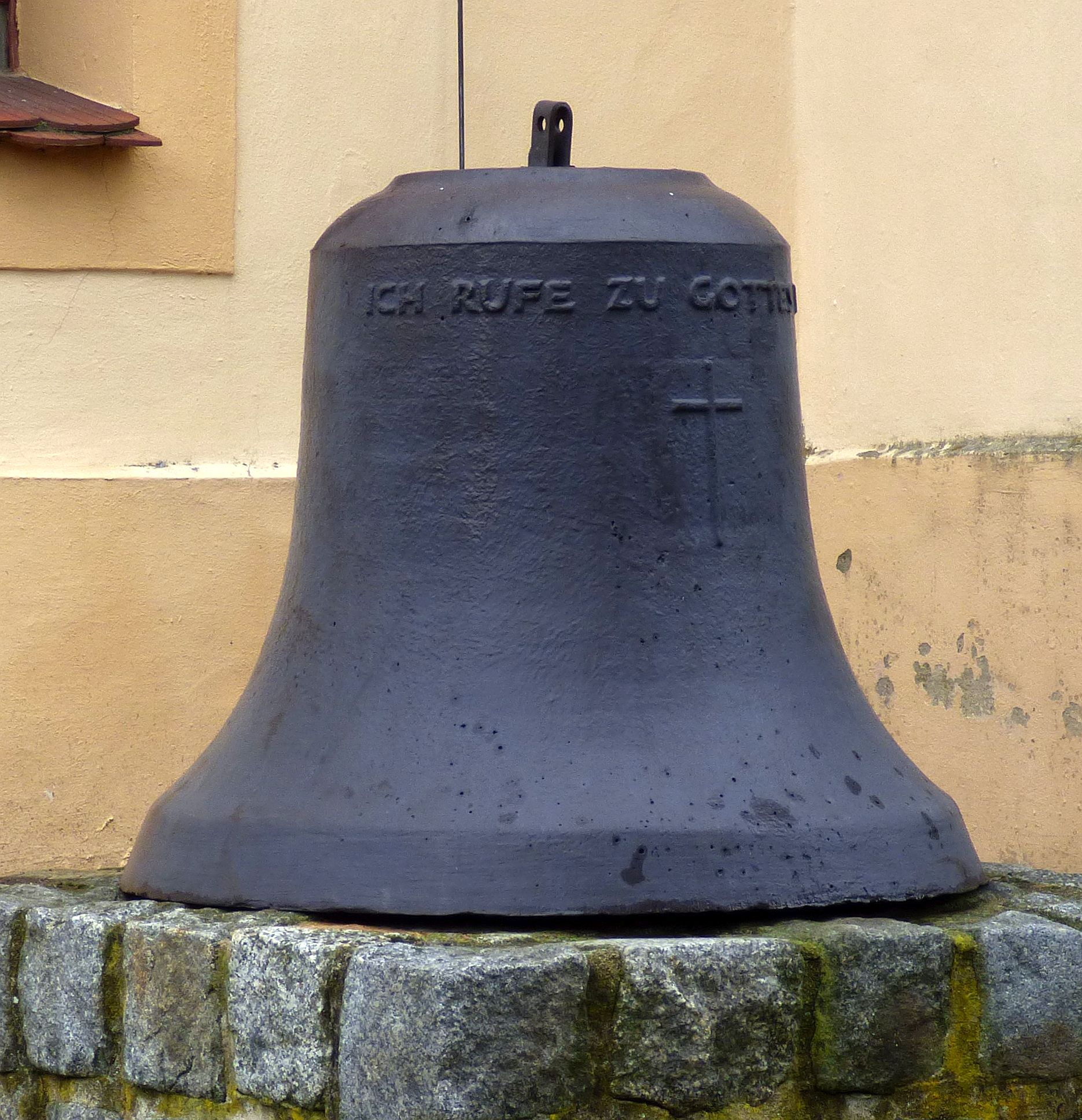 Abgehängte Kirchenglocke in Kahla